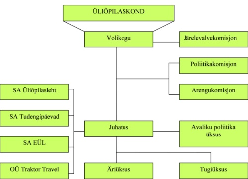 Eesti Üliõpilaskondade Liidu struktuur